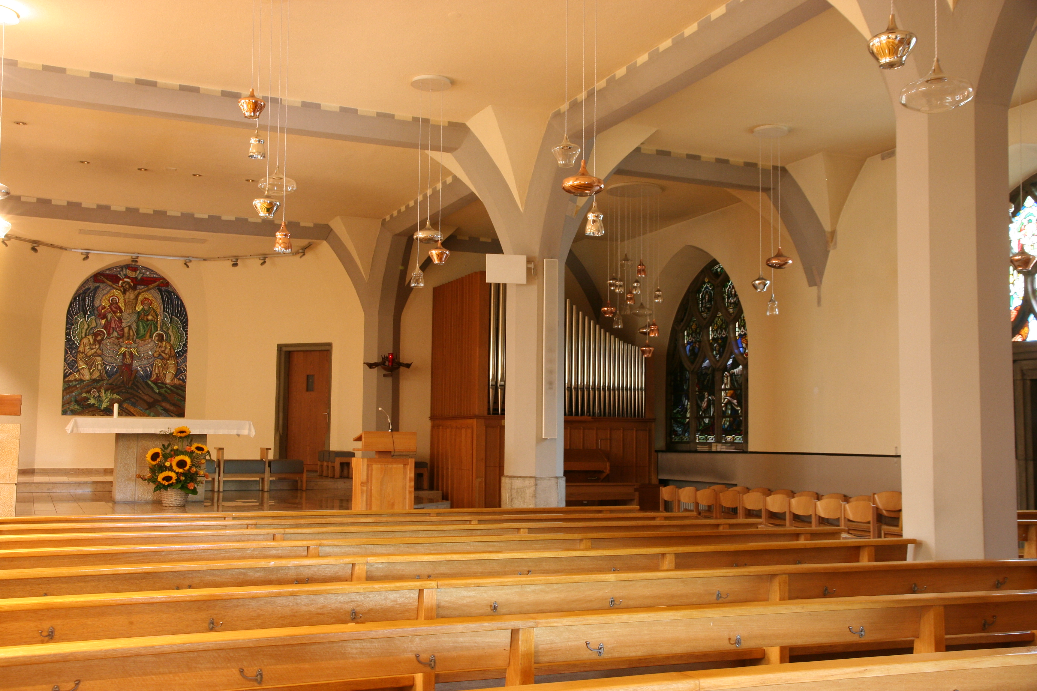 Römisch-katholische Pfarrkirche St. Maria Biel/Bienne, Krypta